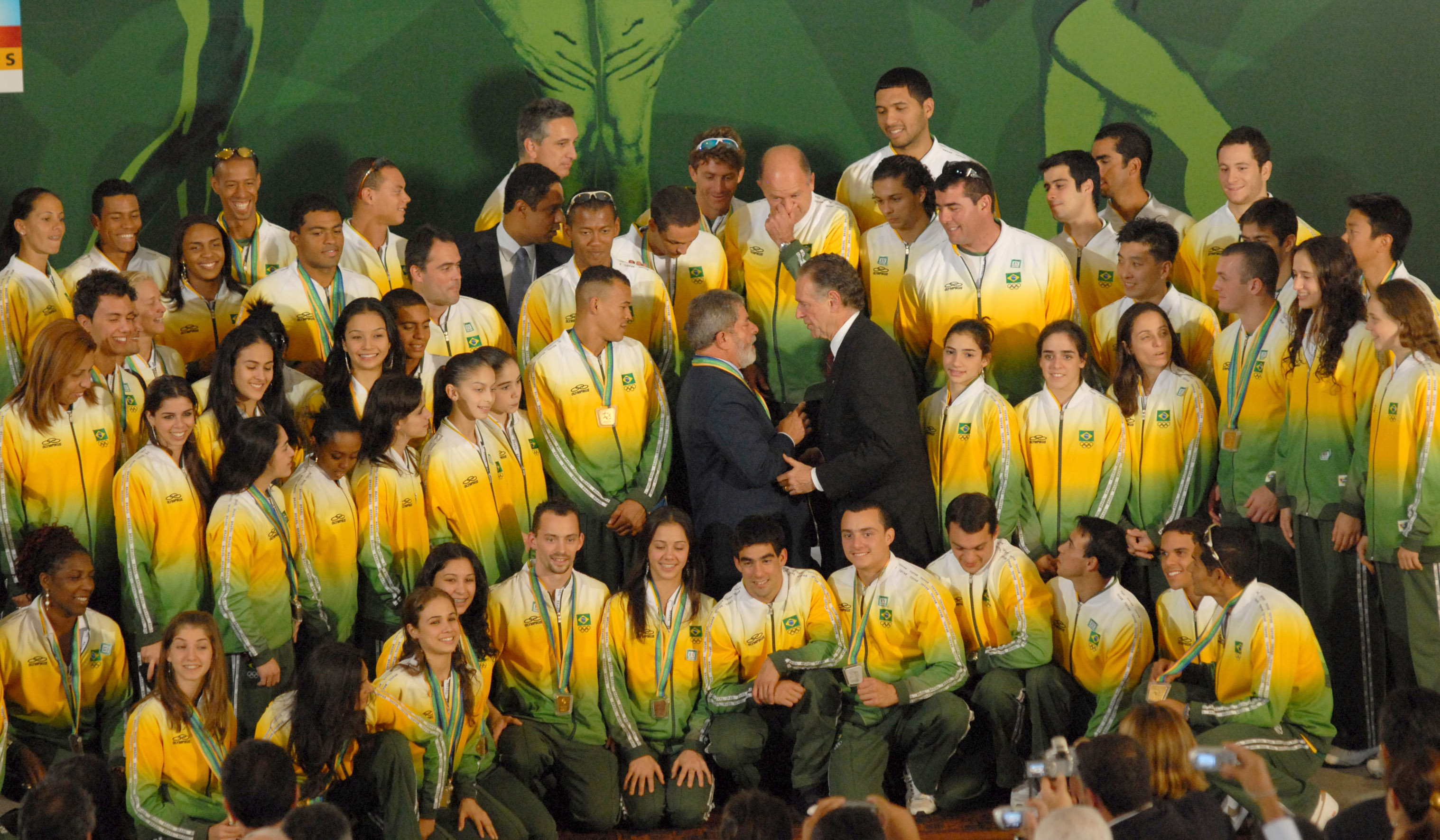 Brasília - Delegação brasileira que foi aos Jogos Pan-Americanos participa da cerimônia de regulamentação da lei de incentivo ao esporte.